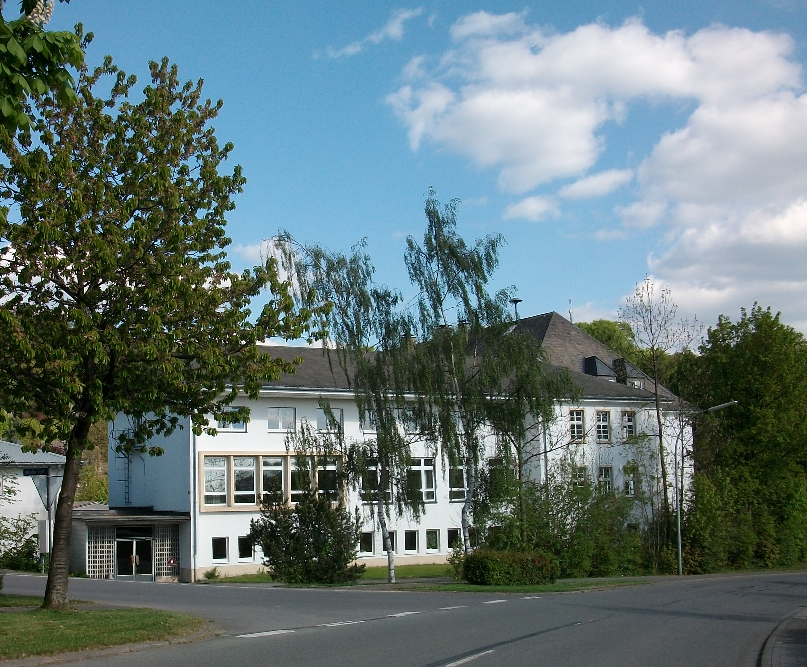 Akademie in Schmallenberg-Bad Fredeburg (Germany)